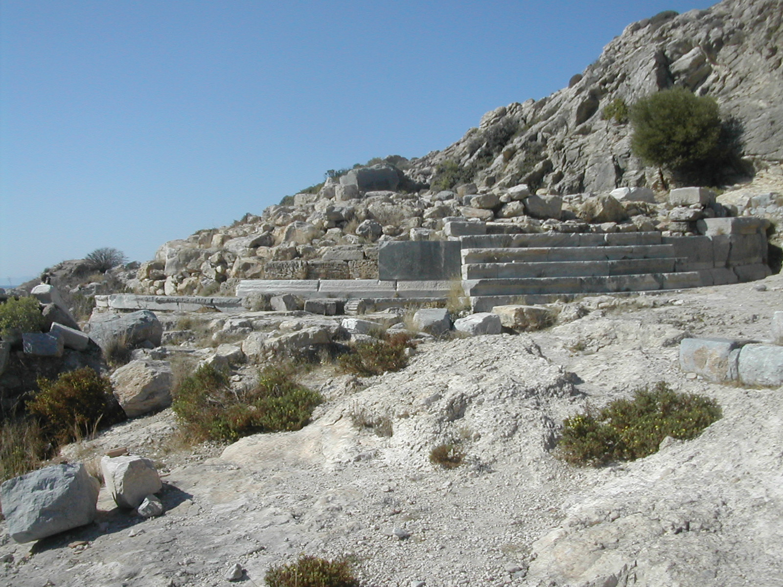 Voici le tholos de marbre blanc dont il ne reste que les marches du soubassement. C'est dans ce temple que se trouvait la célèbre statue d'Aphrodite sculptée par Praxitèle.